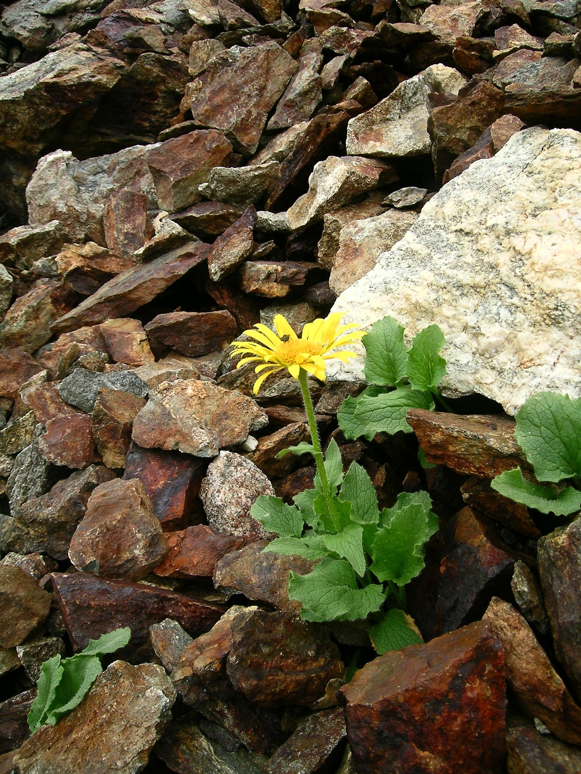 Doronicum grandiflorum, Rottal (2450 m.a.s) am Fuss des Jungfrau, Kanton Bern, Schweiz